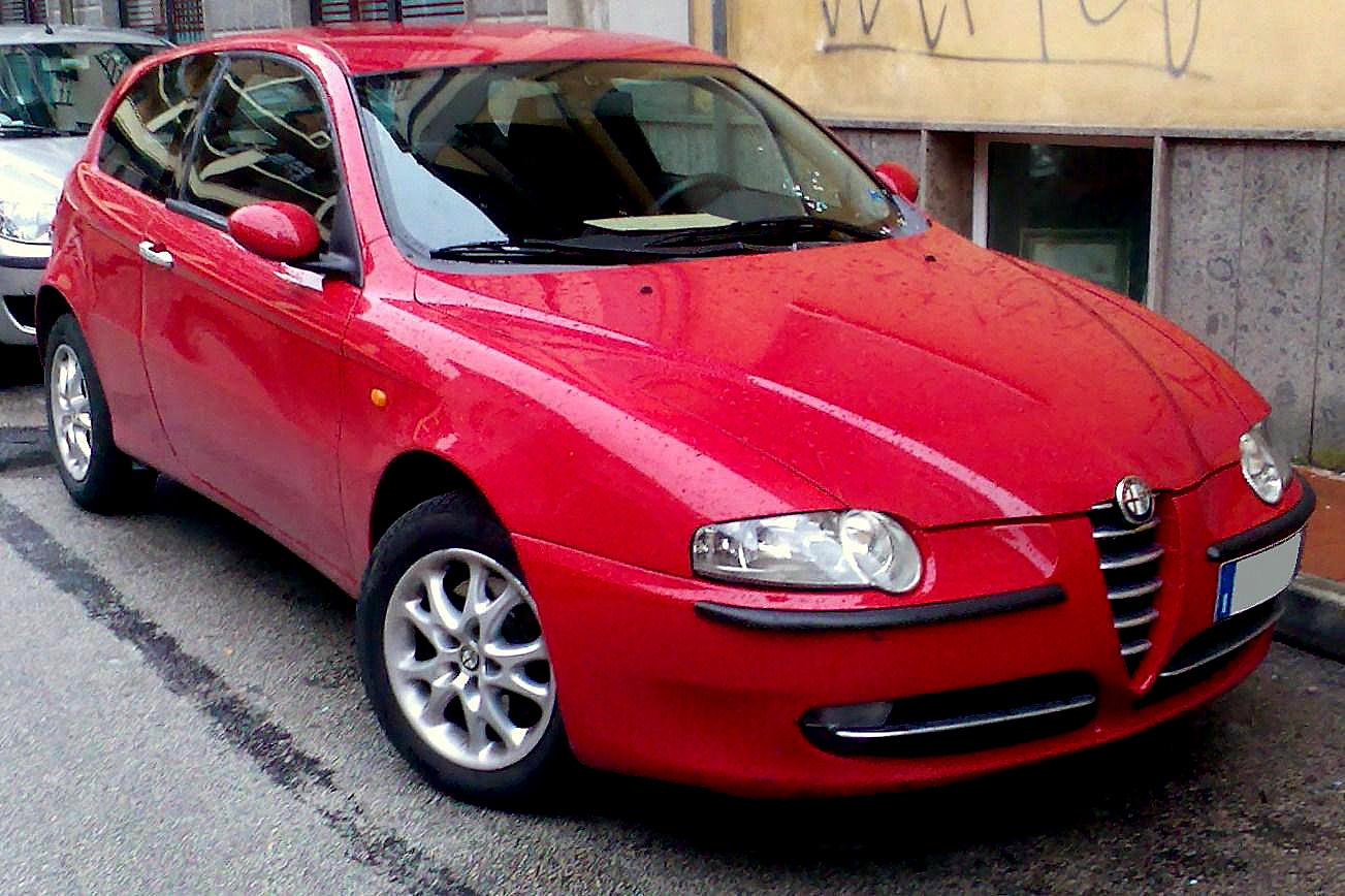 2000 Alfa Romeo 147 Rossa 3porte